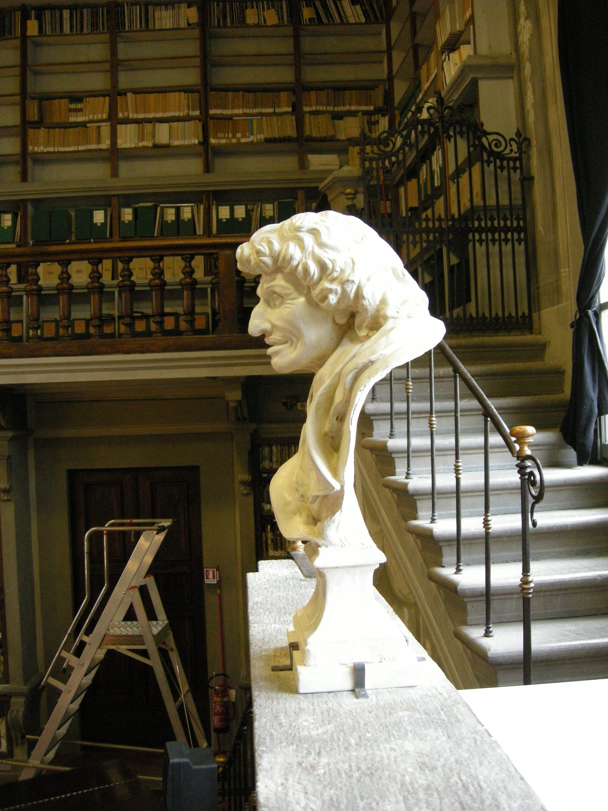 Biblioteca degli uffizi 13 busto magliabechi